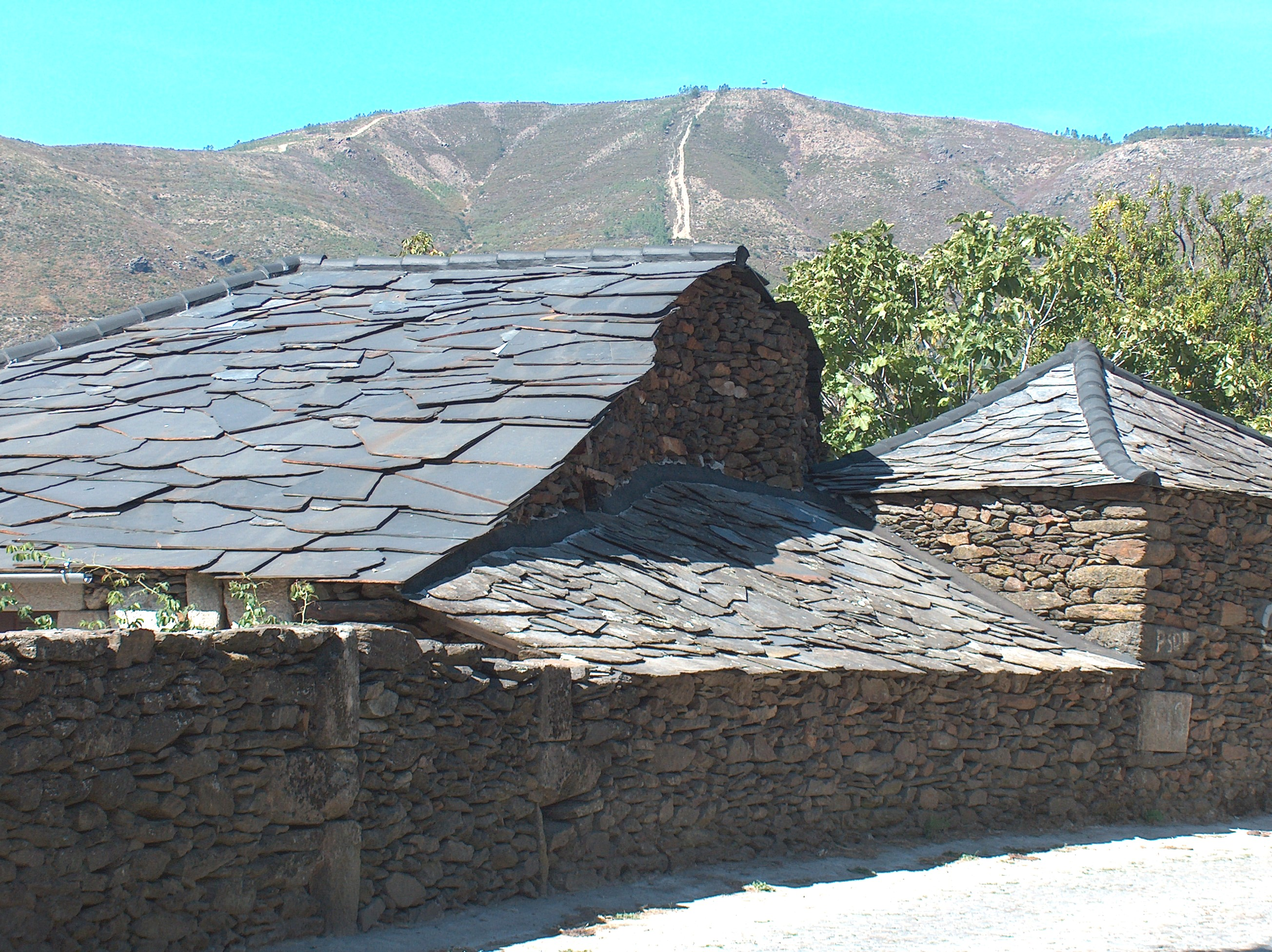 Descrição Casa em xisto, freguesia de Ermelo (Mondim de Basto), concelho de Mondim de Basto, Distrito de Vila Real Fonte Carregada pelo autor Autor João Carvalho